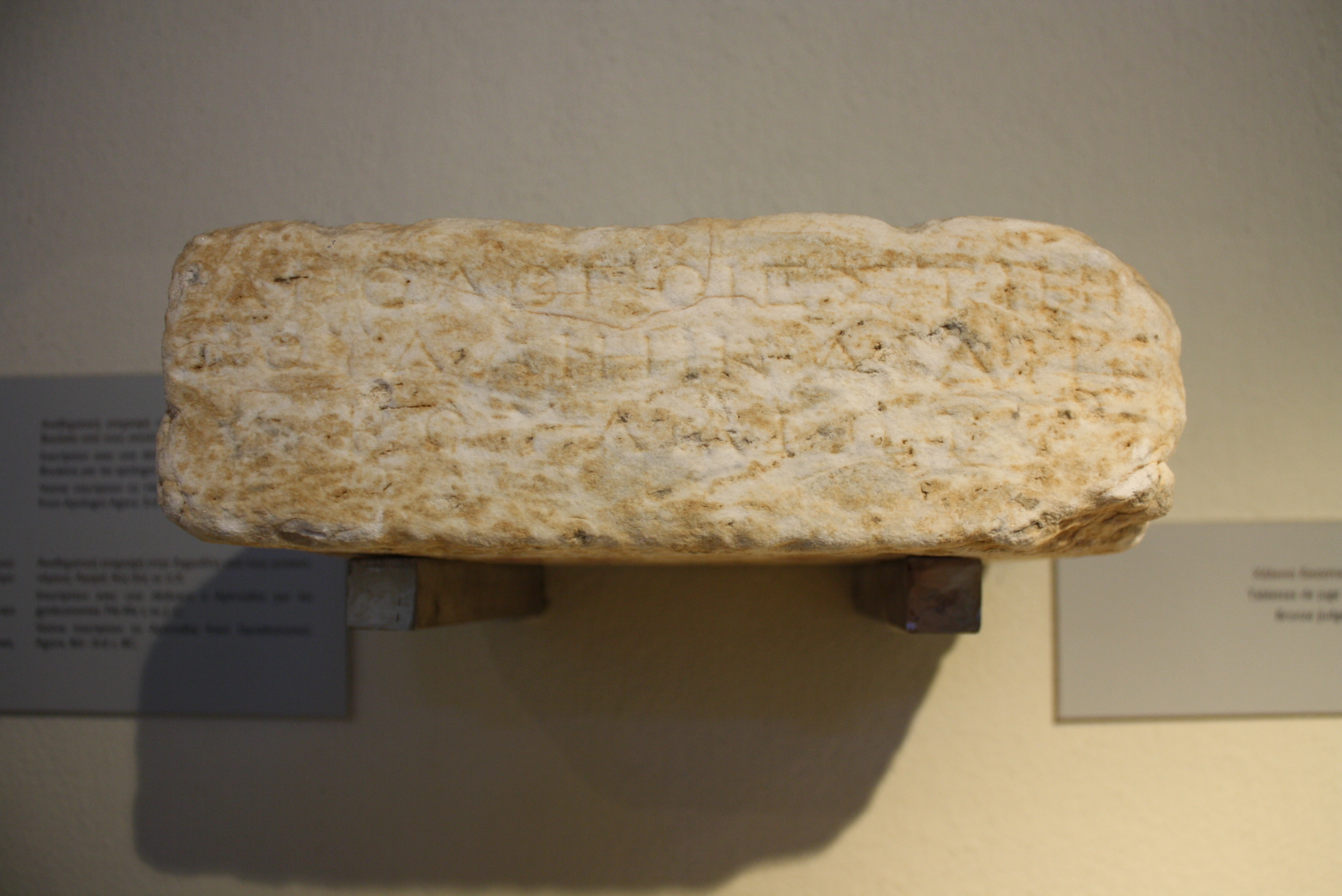 Weihung der Apologoi von Thasos an Hestia Boulaia und Zeus Boulaios, laut dem Archäologischen Museum Thasos aus dem 3. Jh. v. Chr., laut Hamon 2019 Mitte 3. Jh. v. Chr. (?). Siehe Patrice Hamon: Documents publics du quatrième siècle et de l’époque hellénistique (= Corpus des Inscriptions de Thasos. Band 3). Ecole française d’Athènes, Athen 2019, S. 260 f., Nr. 73.